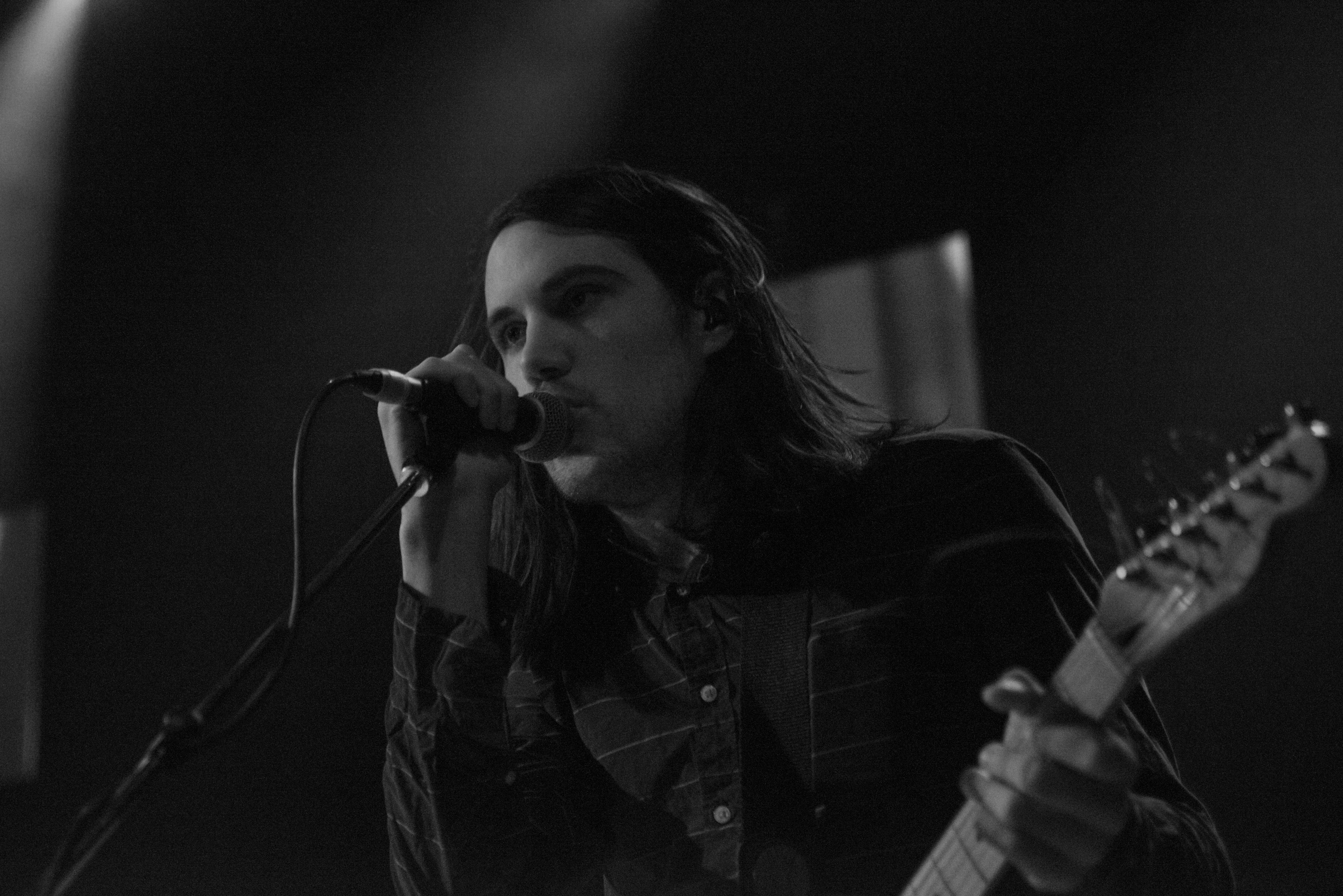 de Cults 2014 Muenchen Kranhalle